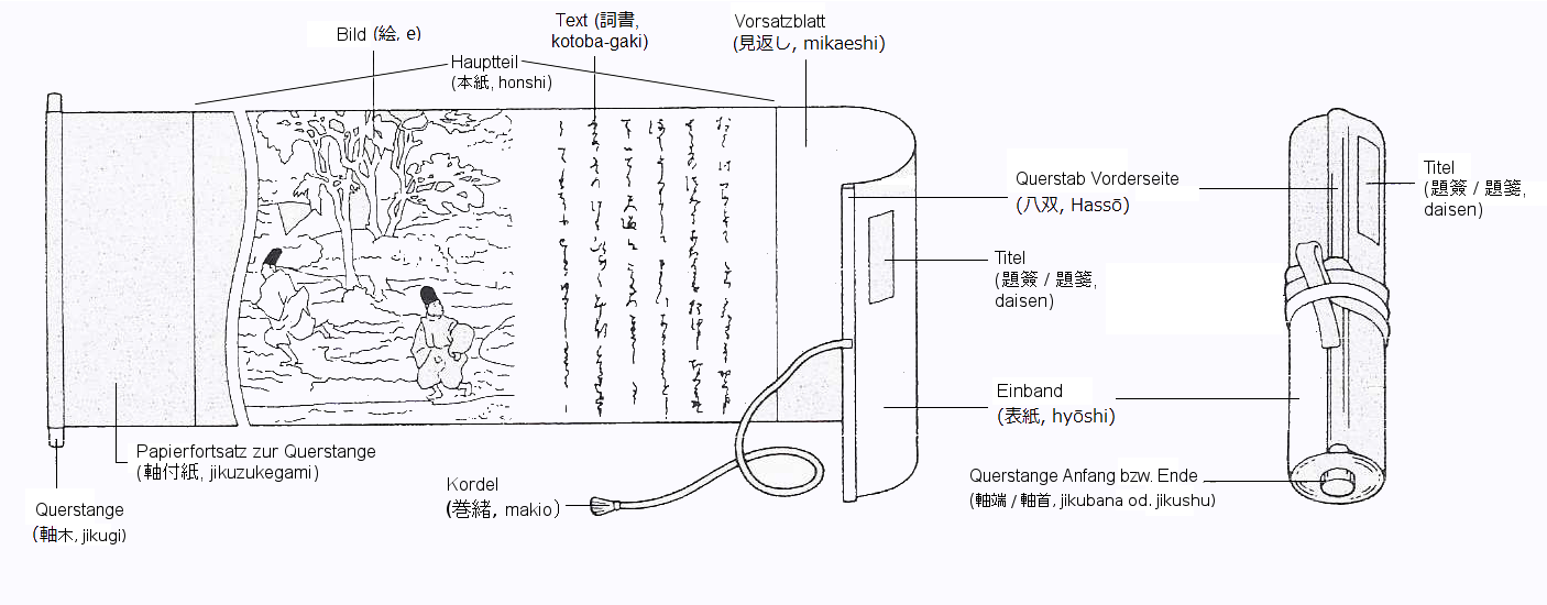 Schema einer Bildrolle; Beschriftung nach 日本美術図解事典 (Bildlexikon zur japanischen Kunst), Tokyo Bijutsu, 2012, S.24